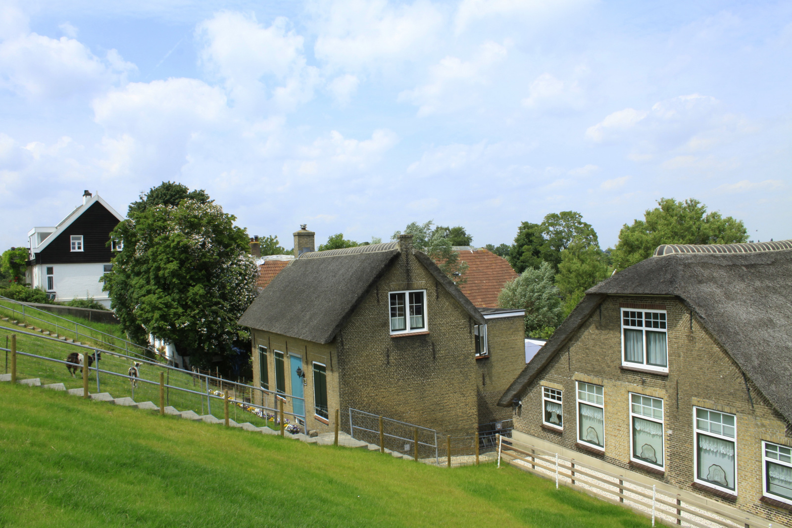 Een buurtschap met heel veel moie oude boerderijen.